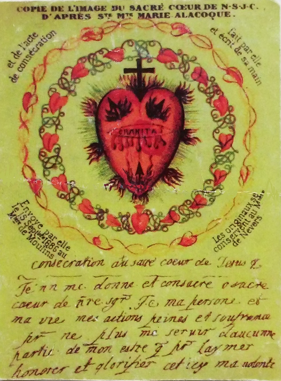 Rysunek Najświętszego Serca Pana Jezusa i pierwsze słowa z rękopisu Aktu Poświęcenia się Mu św. Małgorzaty Marii Alacoque. Pokolorowany. Oryginał w muzeum w Nevers we Francji.